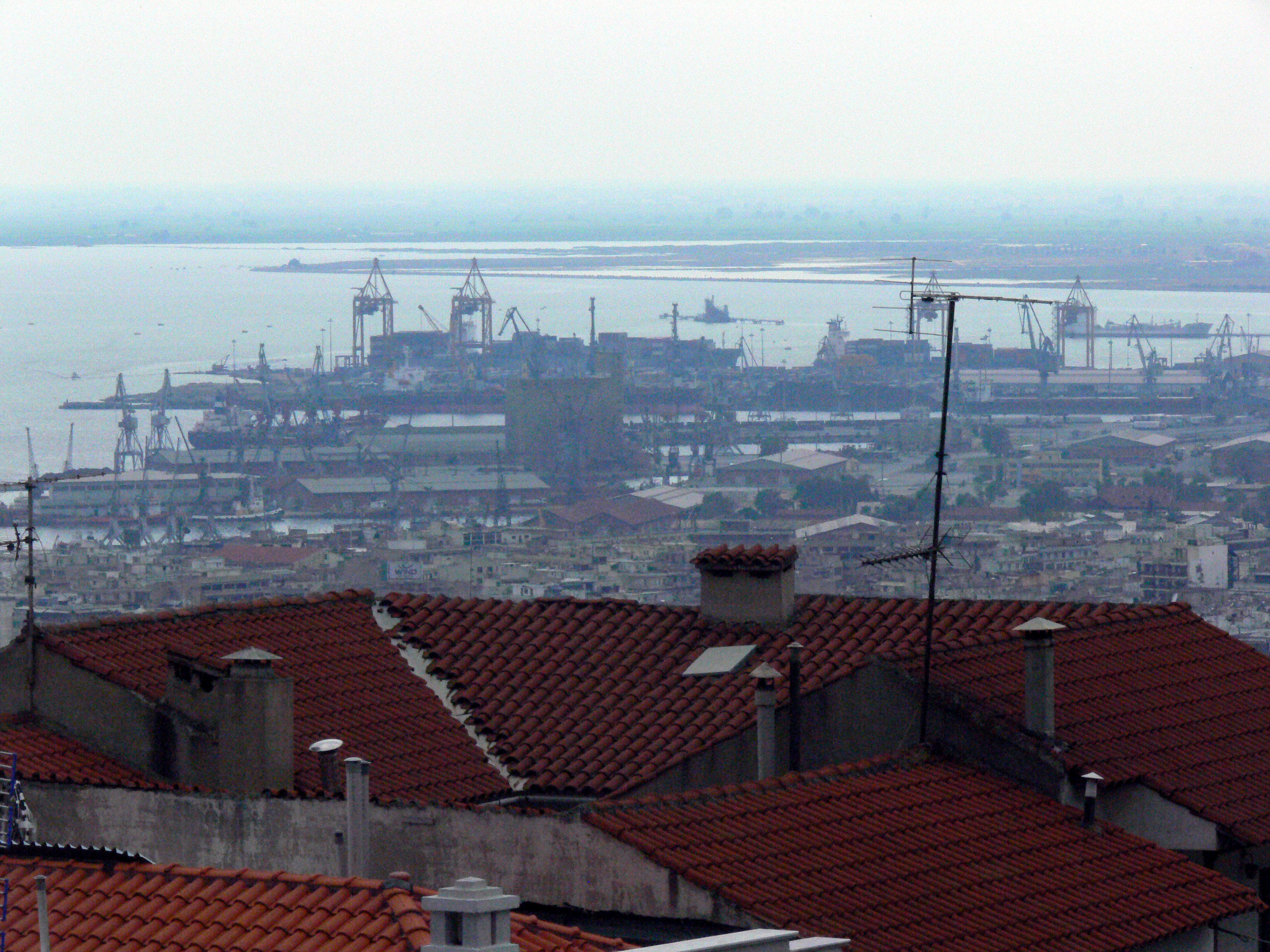 Tessaloniki. Harbour.